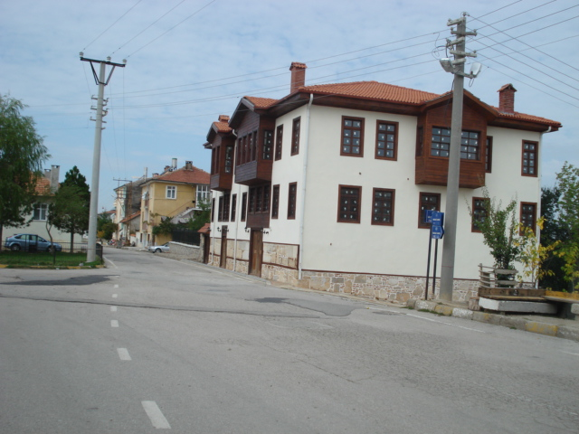 Dosya yükleyen kullanıcıya aittir. Resimdeki bina Yalvaç, Isparta'da bulunan turistik bir mekan olan Yalvaç Evidir.